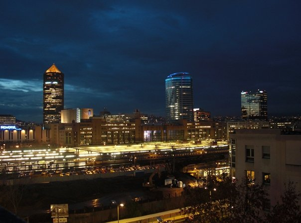 Vue nocturne du quartier de La Part-Dieu (Lyon, Rhône, France).